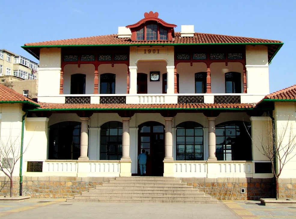 江苏路小学